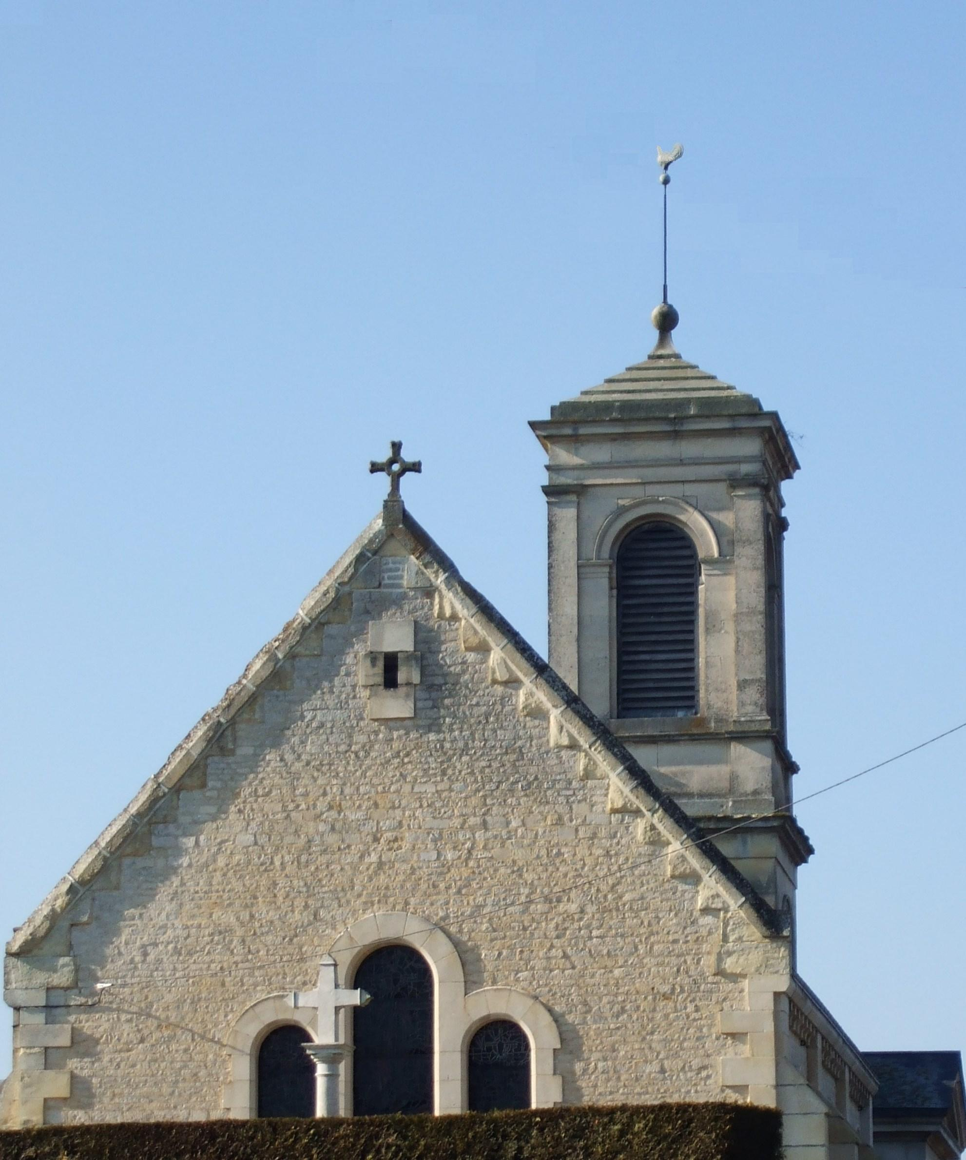 Eglise de La Hoguette du 18ème siècle